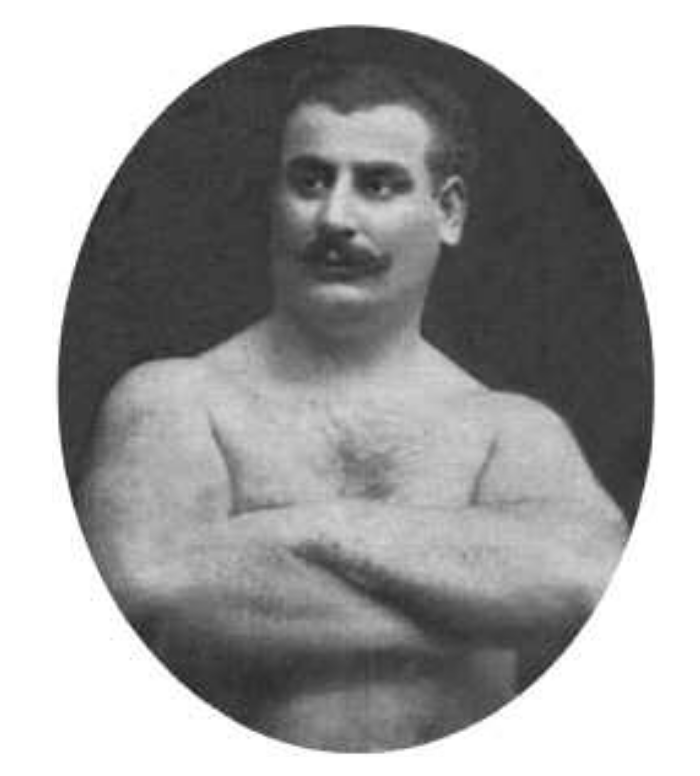 Il lottatore italiano Ernesto Castelli (b.1869 - d.1939) detto Bourlin.